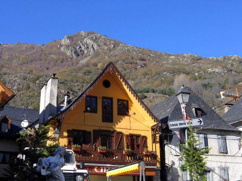 Bossòst, Val d'Aran (Catalunya)